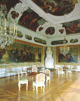 Schloss Eggenberg, Spielzimmer